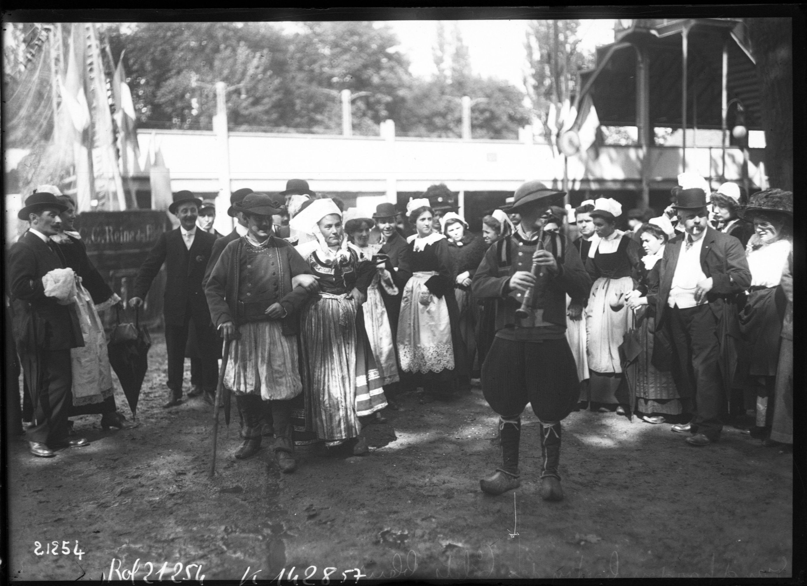 Concarneau : La fête des Filets bleus (Agence Rol, photographie de presse, 1912)